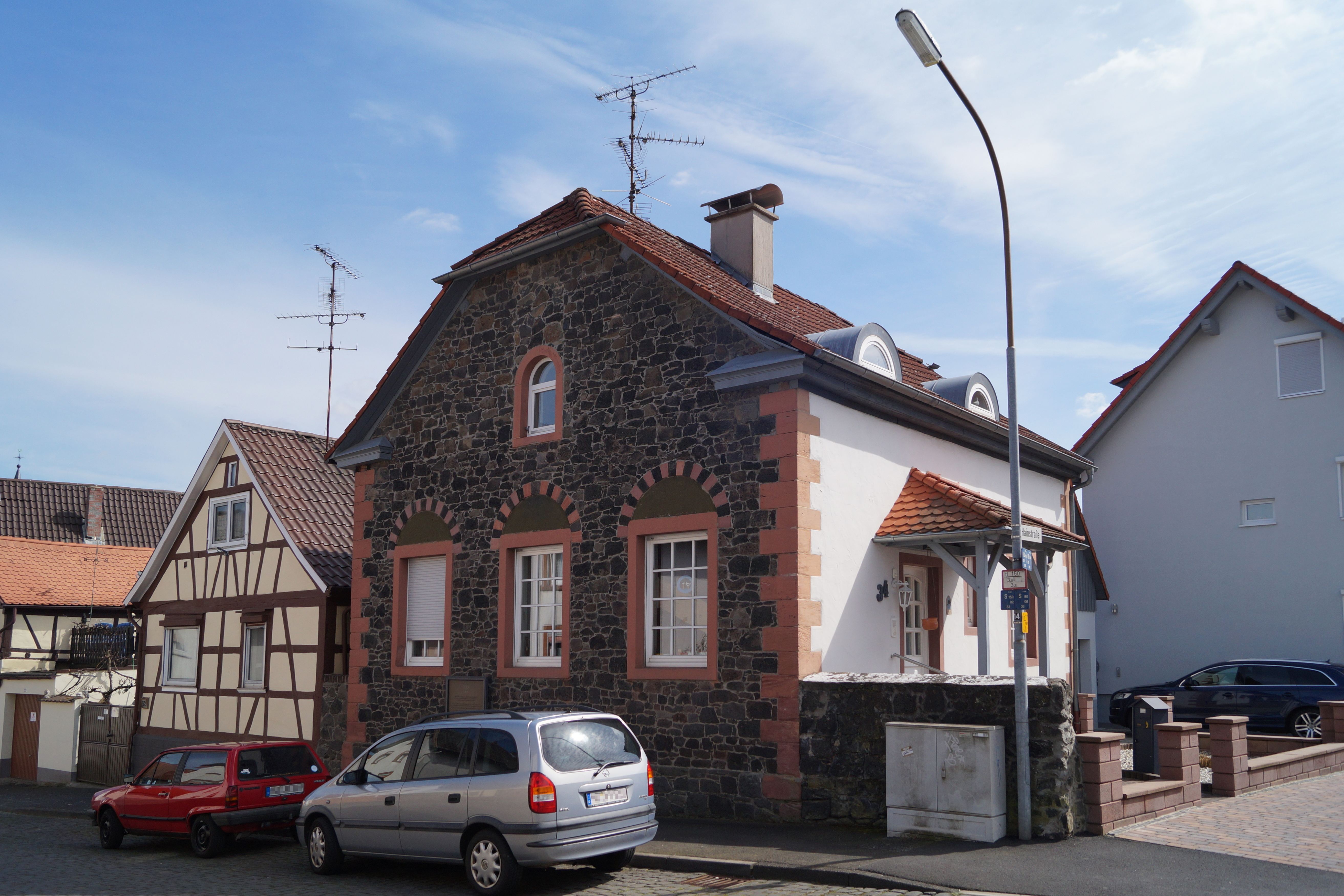 Ehemalige Synagoge Wachenbuchen, Stadt Maintal in Hessen, Ansicht von Nordwesten.